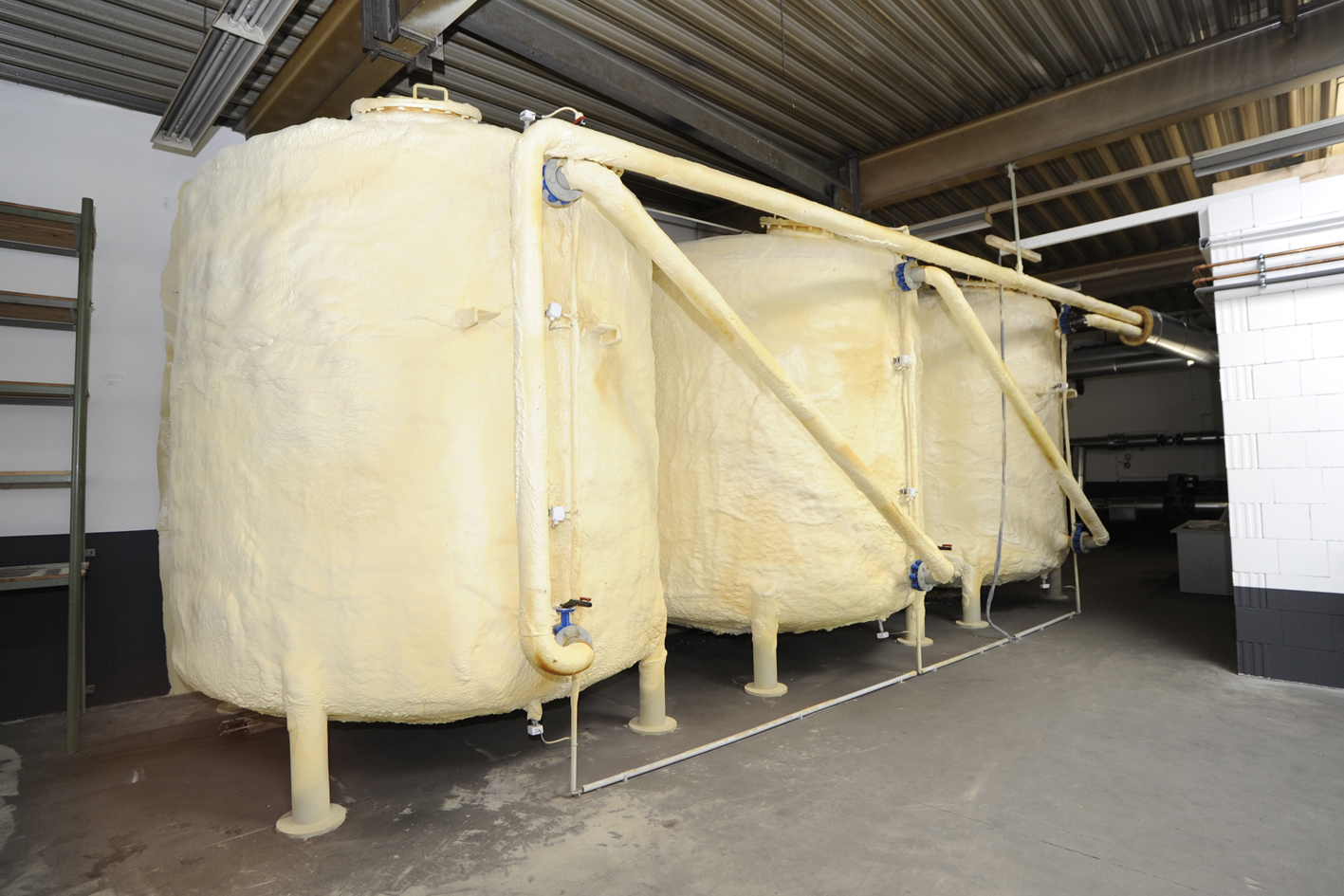 1. Station der Zukunftsenergientour: Gemeinde Anröchte Minister Remmel besucht das Bioenergiedorf Altenmellrich Flickr tags: Anröchte; Plus-Energie-Gemeinde; Soest; Energiewende; Zukunftsenergientour; EnergieAgentur.NRW; Klimaschutz; Johannes Remmel; Klimawandel; Erneuerbare